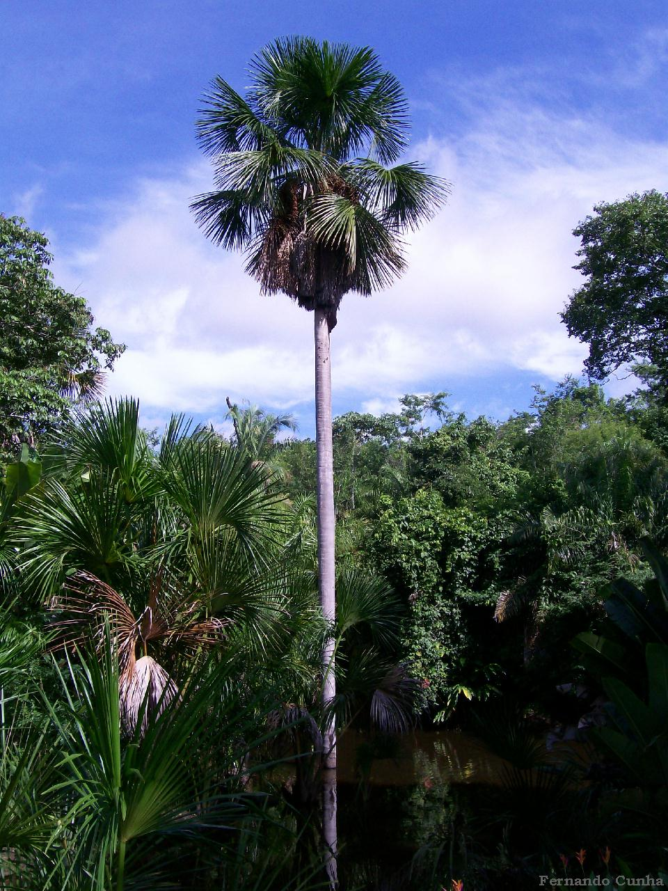 Palmeira do buriti (Mauritia flexuosa)